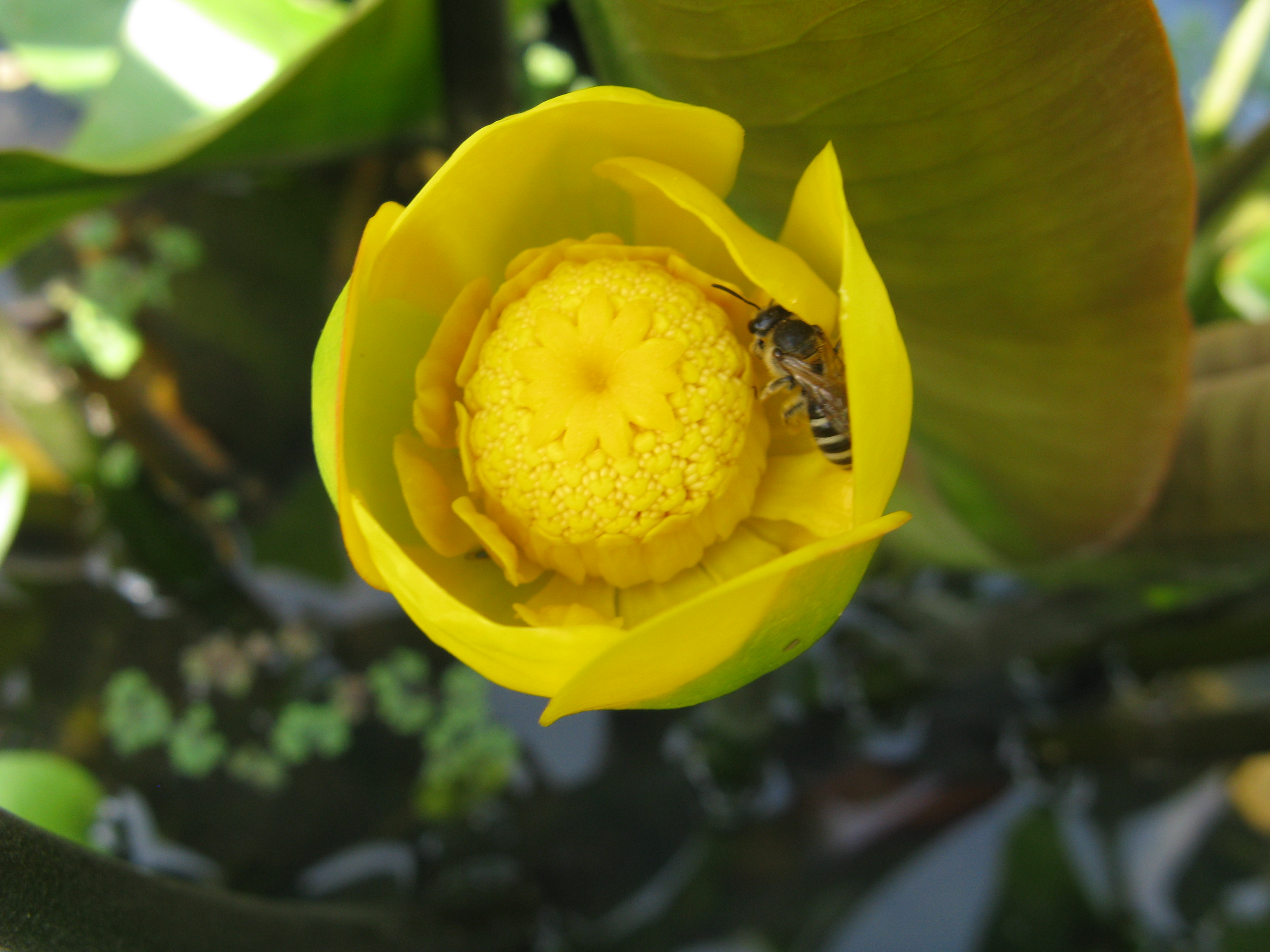 Scientific name Nuphar japonica